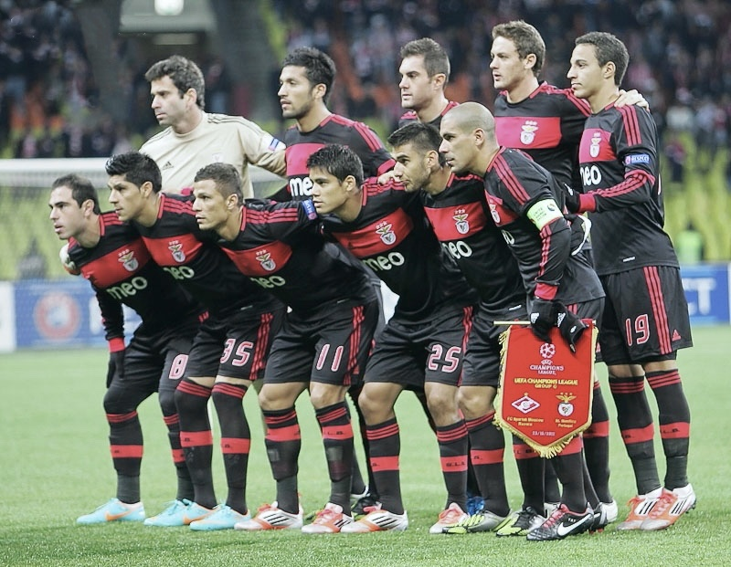 Onze inicial do Sport Lisboa e Benfica para o jogo com o Spartak de Moscovo